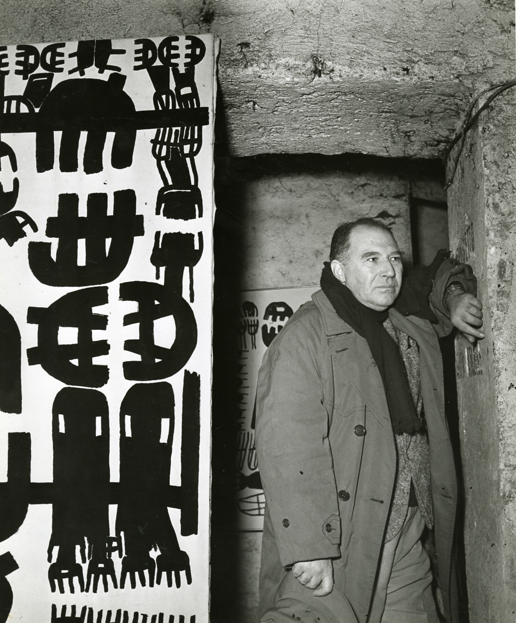 Servizio fotografico : Milano, 1955 / Paolo Monti. - Stampe: 4 : Positivo b/n, gelatina bromuro d'argento/ carta, 30x40. - ((Al verso delle stampe iscrizioni didascaliche manoscritte a matita; timbro a inchiostro con copyright (Via Colonna - Milano); timbro a inchiostro di collezione: "Circolo Fotografico 'La Gondola' "; timbri a inchiostro di mostre: "2eme Biennale/ Mediterranéènne/ photo - Cinema/ Nice 1957", "Bordeaux 1955", e di una mostra greca. - Sul coperchio della scatola iscrizione didascalica manoscritta a pennarello nero: "Ritratti - Figure ambientate". - Partecipazione ad una mostra con stampa b/n 30x40 cm, intitolata "Il pittore/ Capogrossi" (cfr. timbri al verso: "2eme Biennale/ Mediterranéènne/ photo - Cinema/ Nice 1957", "Bordeaux 1955", e di una mostra greca: "Circolo Fotografico 'La Gondola' ").